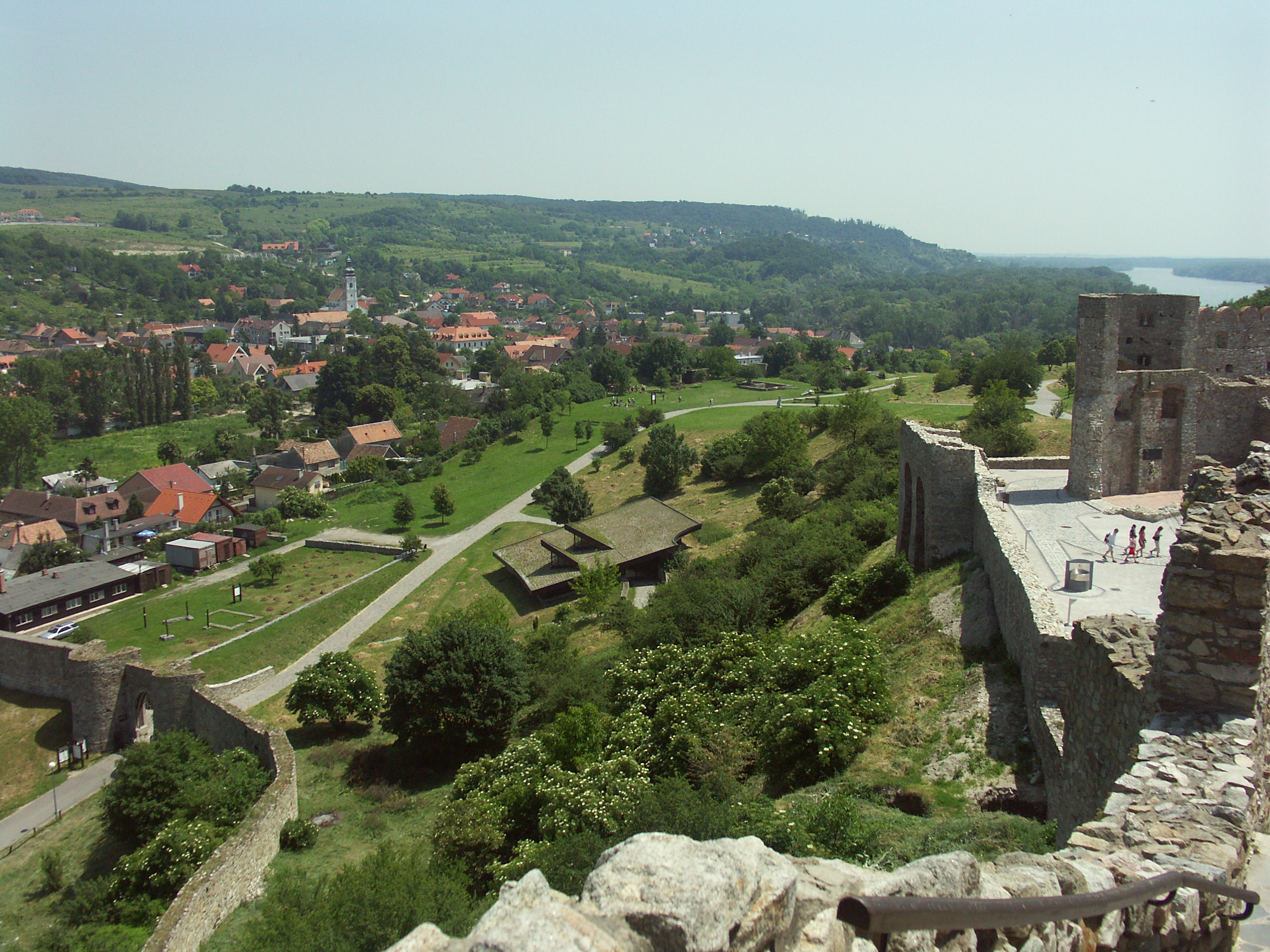 Castle Devín, Bratislava (Devín village), Slovak Republic